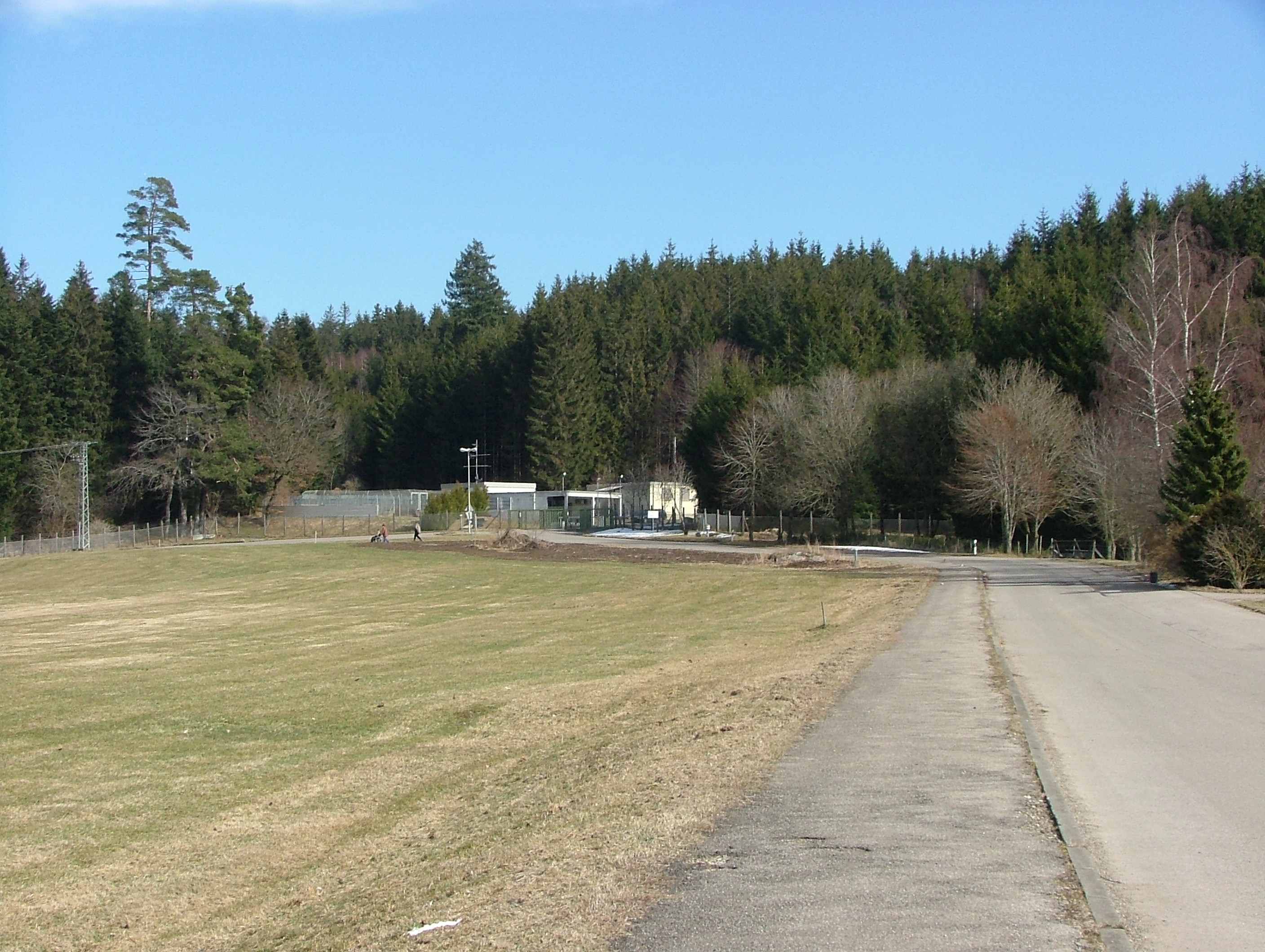 Heeresmunitionsanstalt Urlau, kurz: Muna Urlau